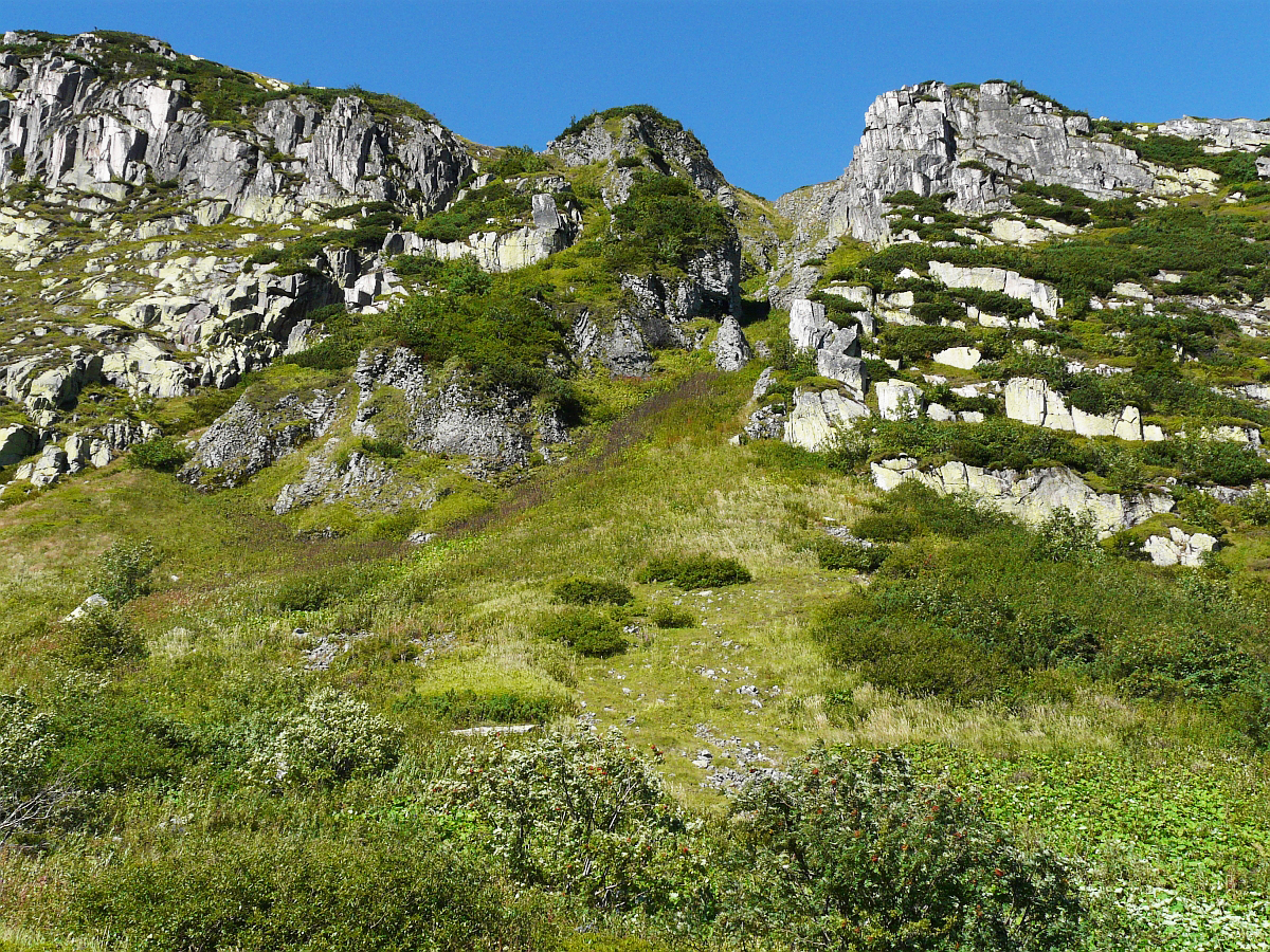 Karkonosze